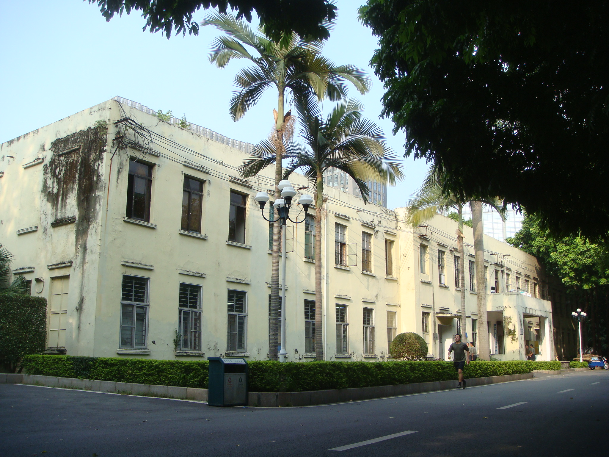 黄埔军校燕塘分校旧址。位于广东省广州市天河区禺东西路38号中国人民解放军特种作战学院内。